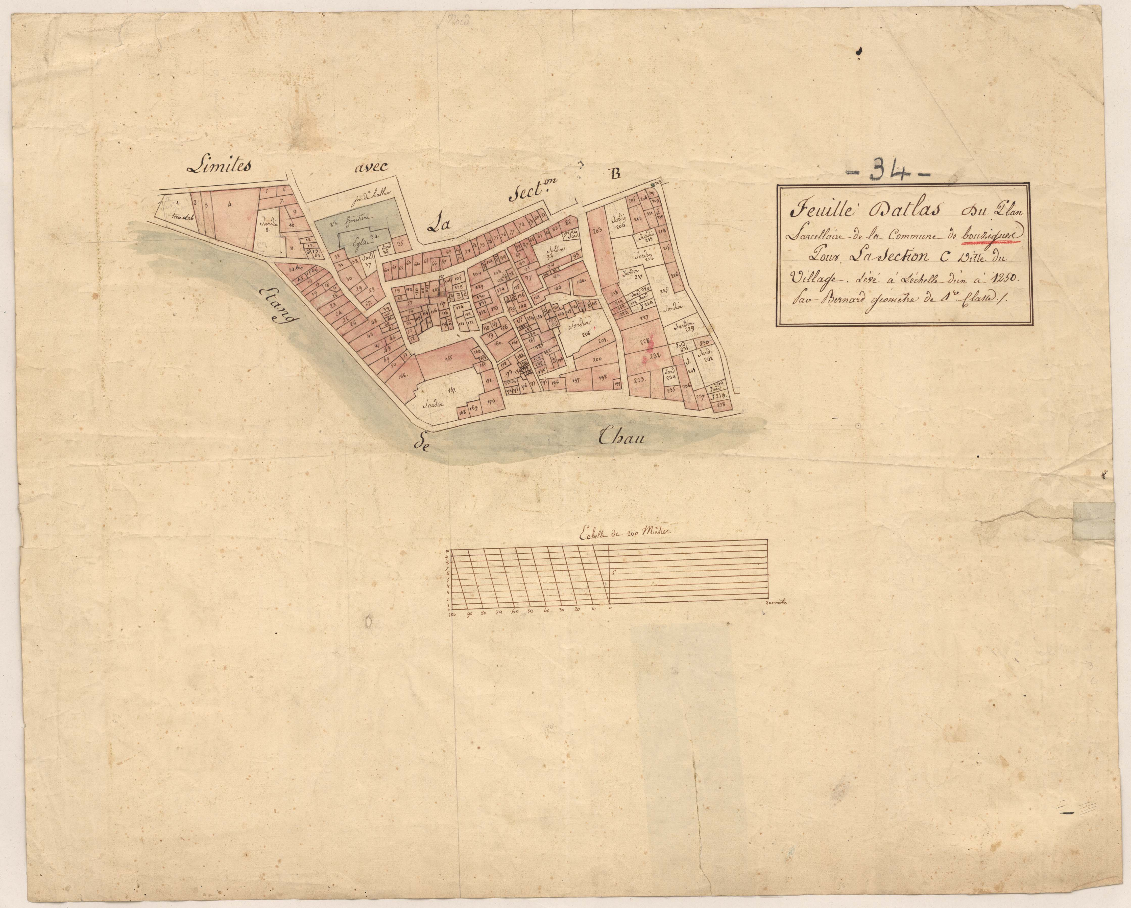 Bouzigues. - Cadastre napoléonien : plan de la section du Village.